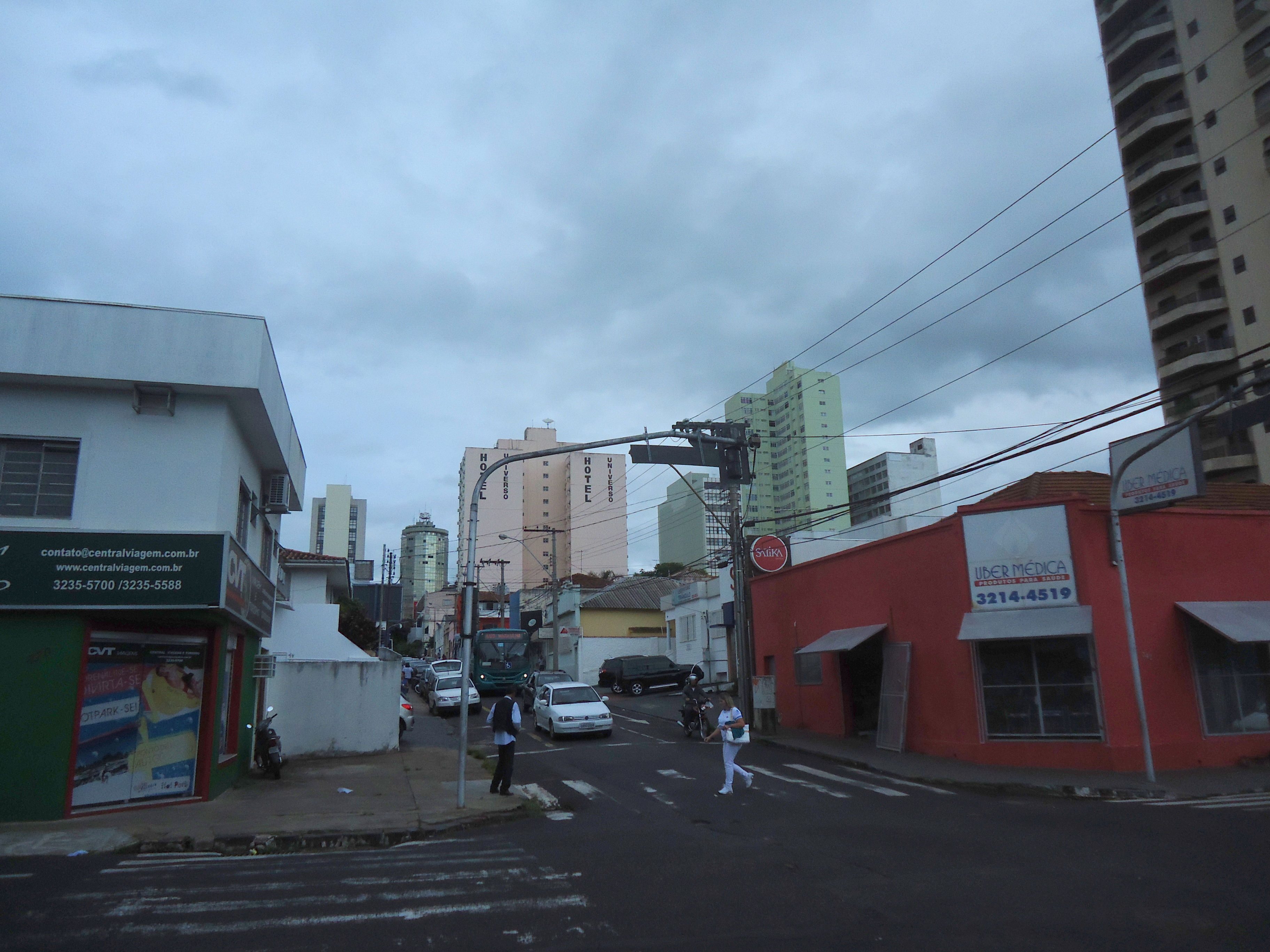 Rua Duque de Caxias, esquina com a Av. Cipriano Del Fávero, no centro de Uberlândia.